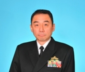 佐伯精司 海将